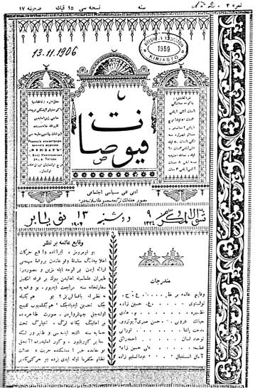 تۆرکجه: آزربایجان تورکجه‌سینده اولان فیوضات درگیسی